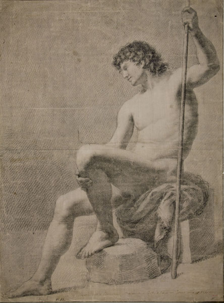 Dibujo nu masculí «desnudo masculino», de Francesc Agustín i Grande, de fecha 1780, conservado en el Museo Nacional de Arte de Catalunya, Barcelona, España.